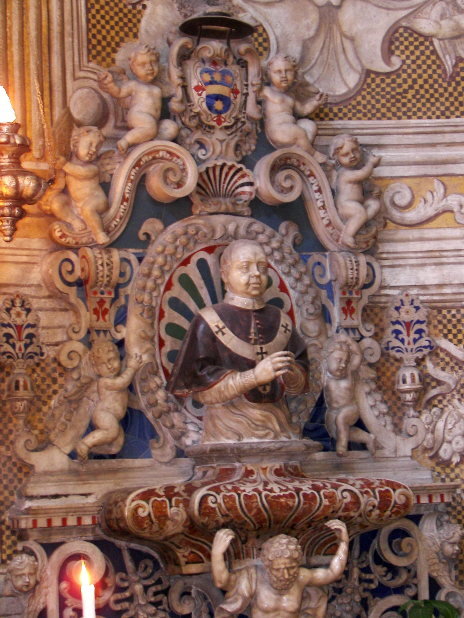 celebre monumento sepolcrale marmoreo del XVIII secolo del vescovo Andrea Riggio, sito presso la cappella di Sant'Agata nella Cattedrale di Catania